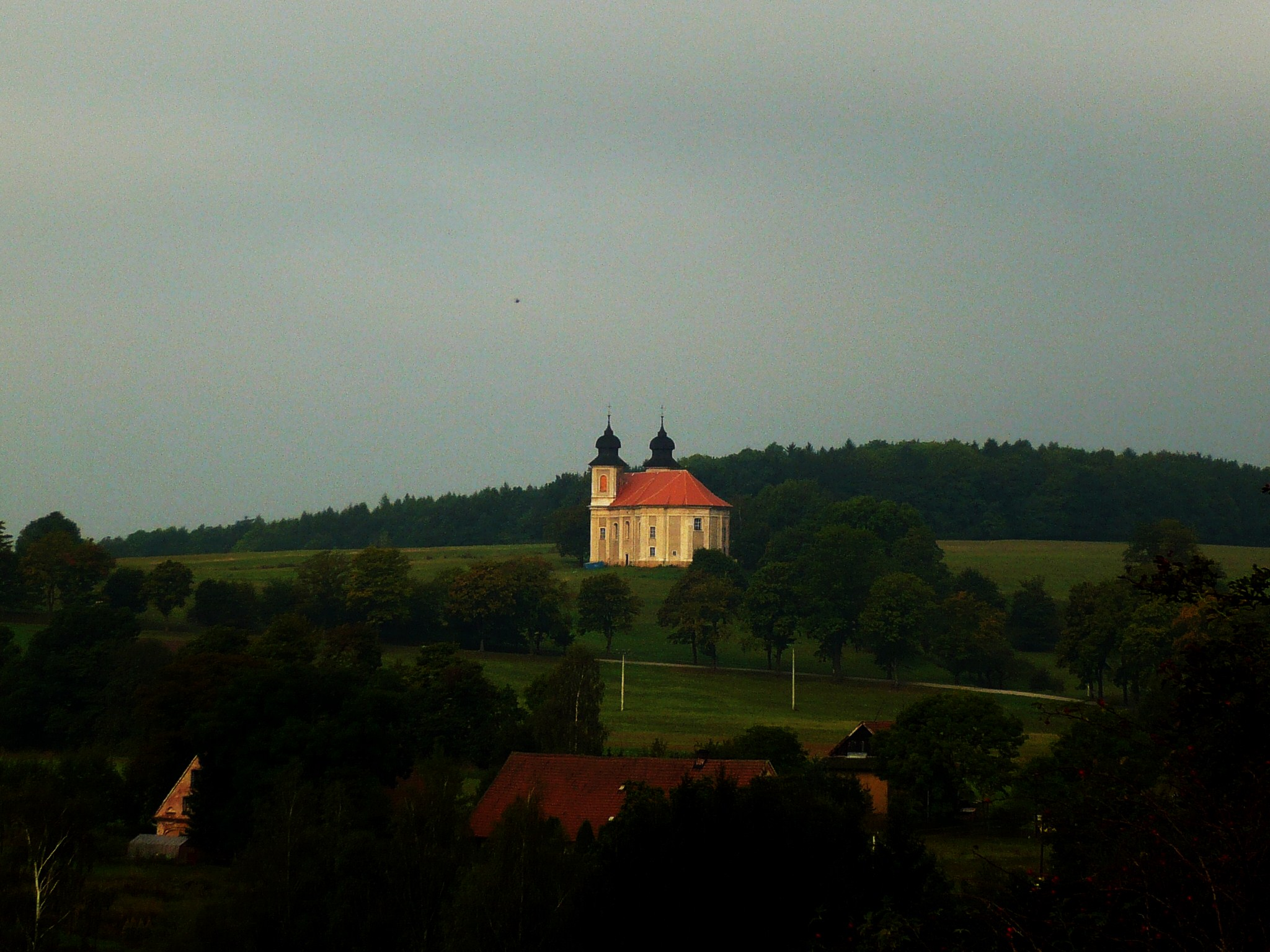 Sonov. Kościół pw. św. Markety